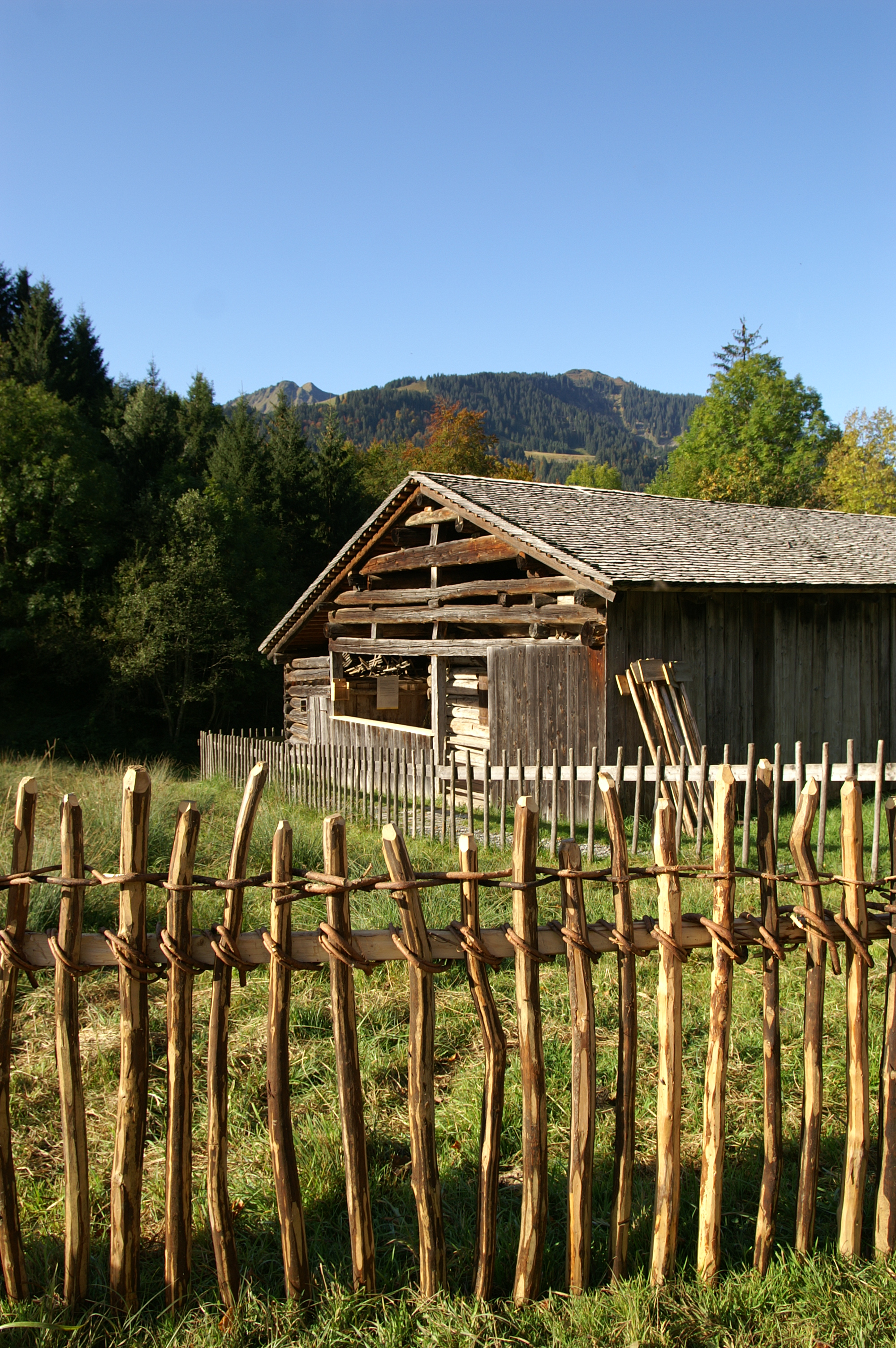 Speltenzaun mit einfacher Flechtung auf dem Holdamoos in Schoppernau